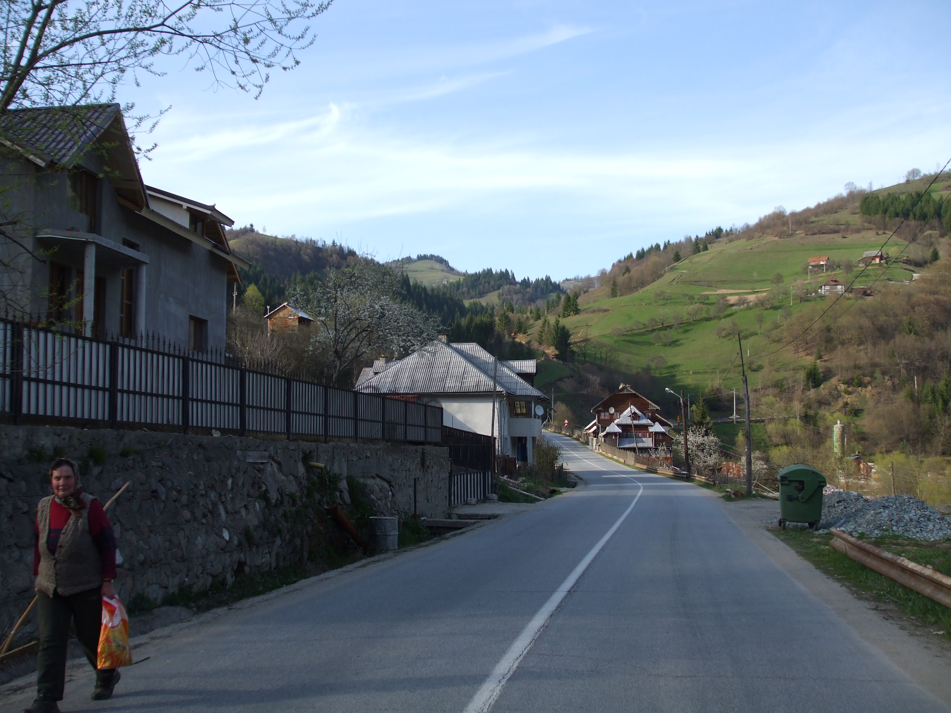 Imagini din Vadu Moţilor, jud.Alba